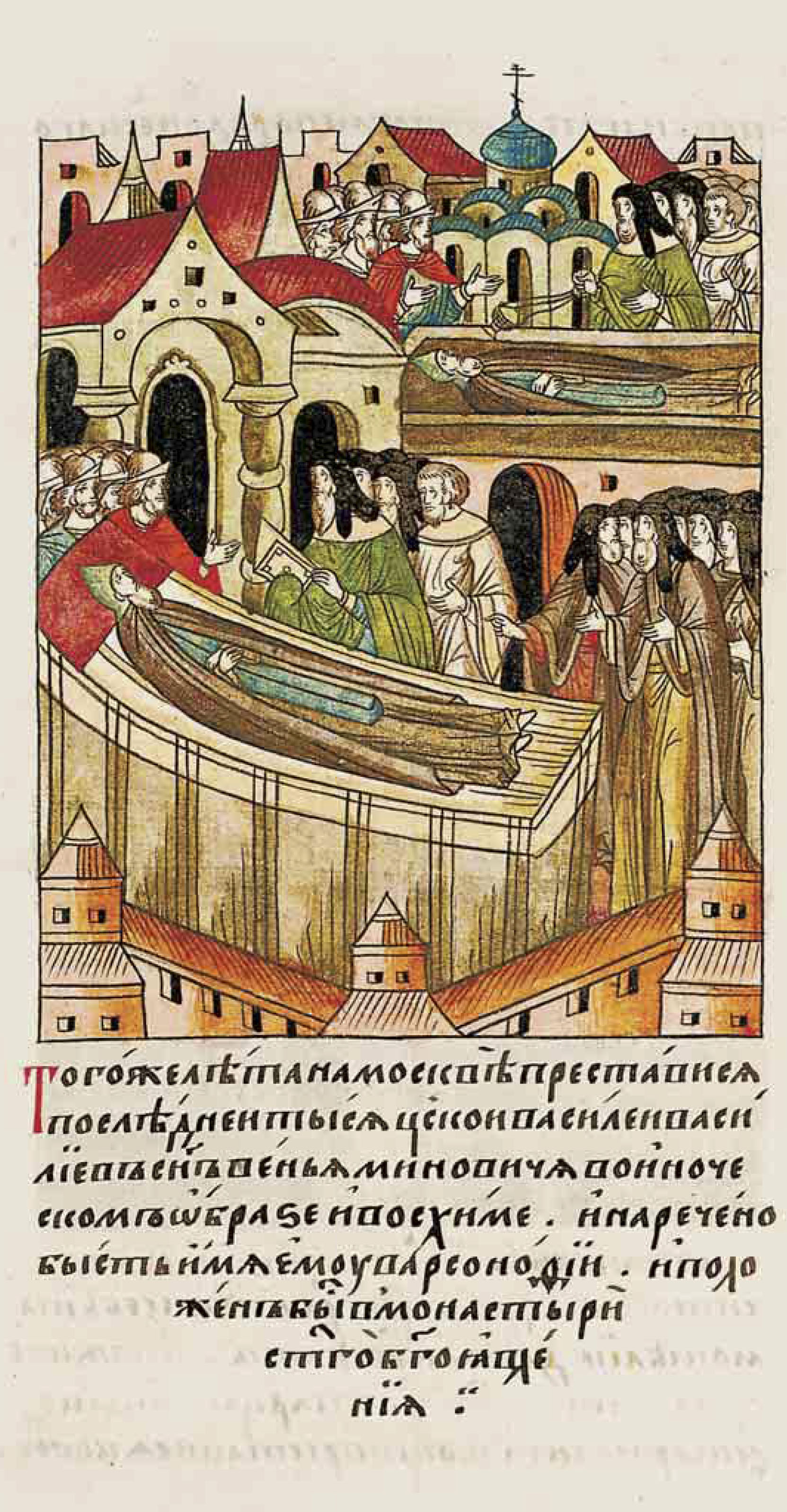 ЛИЦЕВОЙ ЛЕТОПИСНЫЙ СВОД В том же году в Москве преставился в иноческом образе и схиме последний тысяцкий Василий Васильев, сын Вениаминовича, его имя в монашестве было Варсонофий, похоронен он был в монастыре святого Богоявления.